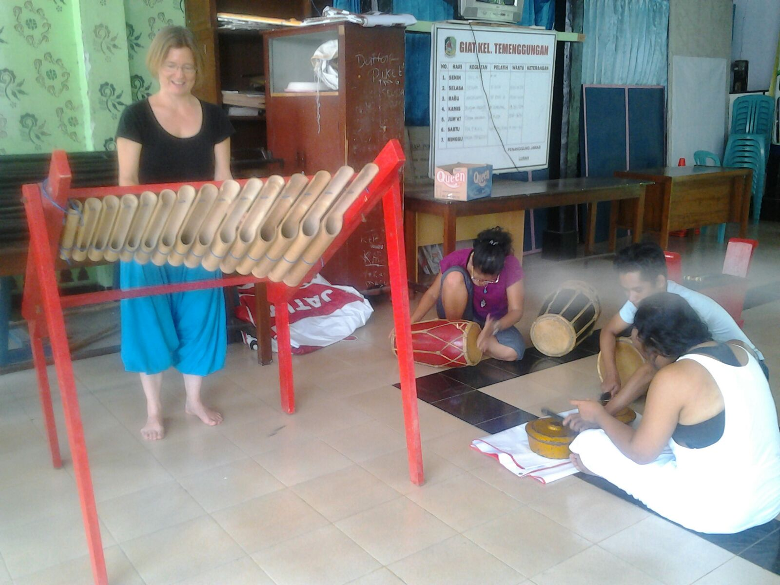 belajar angklung Banyuwangi